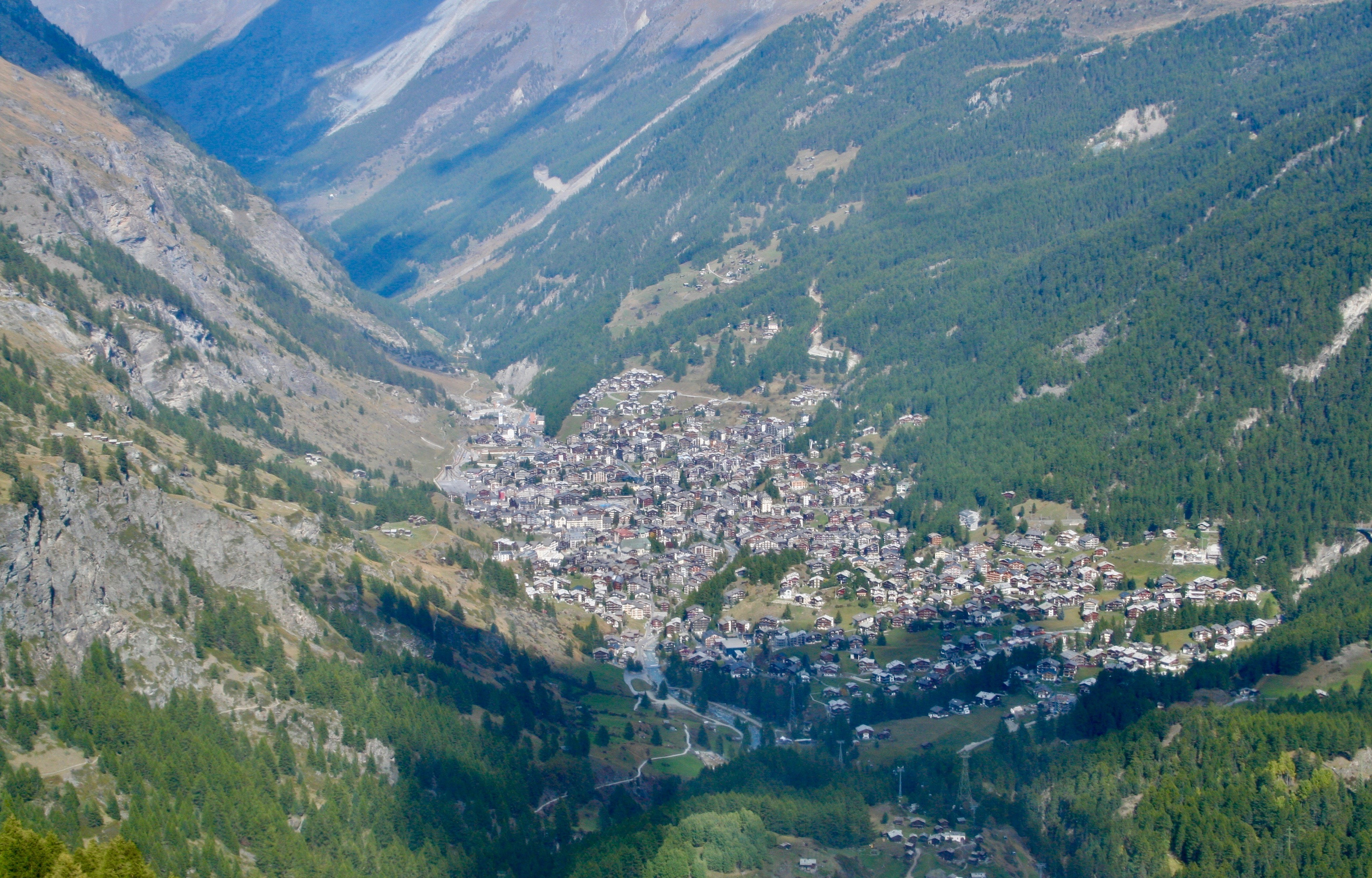 Vue sur le village de Zermatt, en Valais (Suisse).